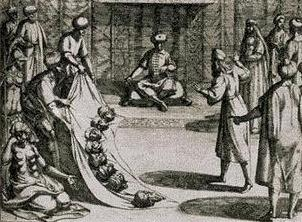 Grabado de Otto Venius sobre Los Siete Infantes de Lara